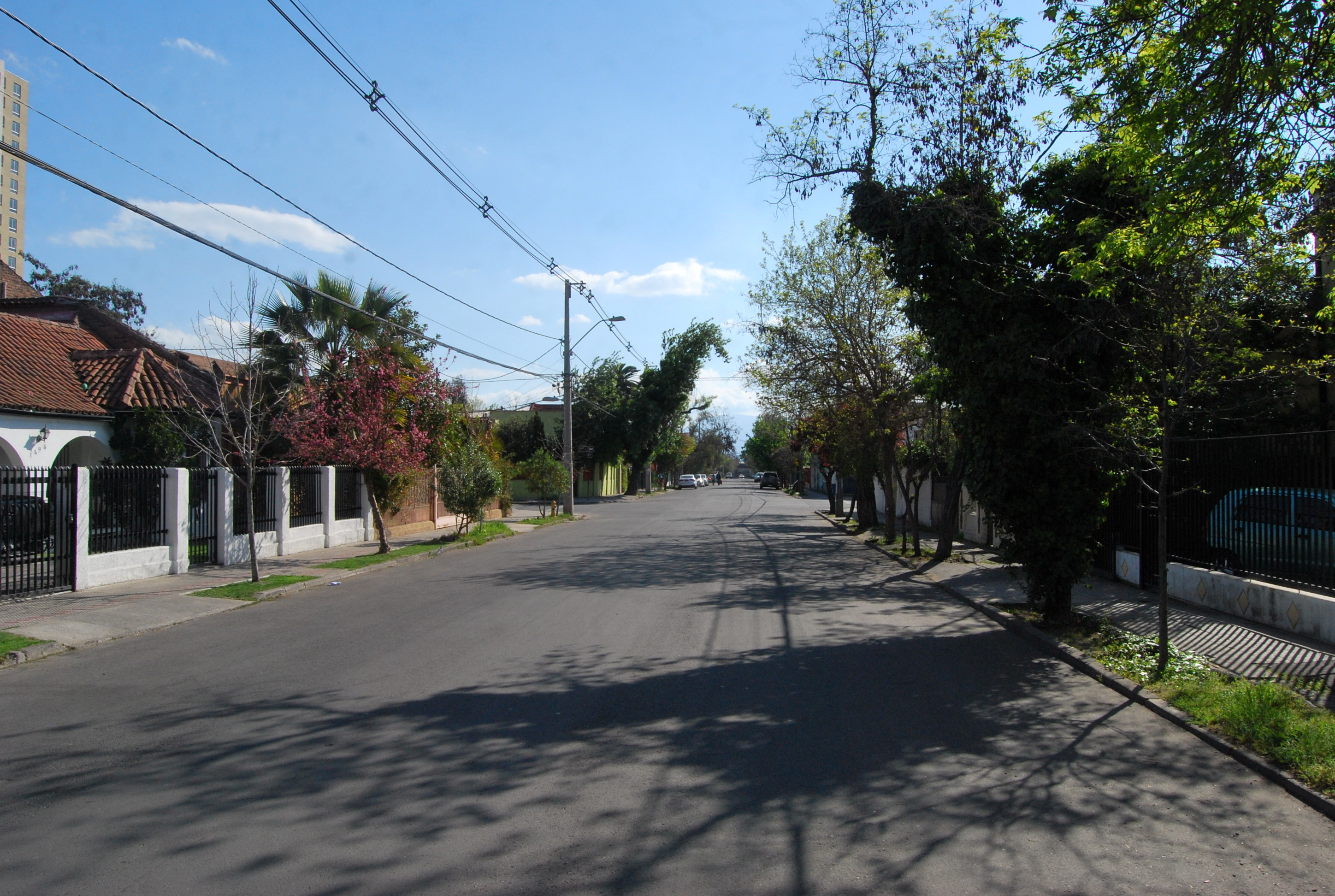 Población Los Castaños This is a photo of a national monument in Chile: 418